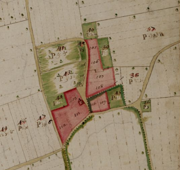 Mappa del Catasto Teresiano relativa all'allora comune di Castellazzo de' Barzi (MI) - Italy